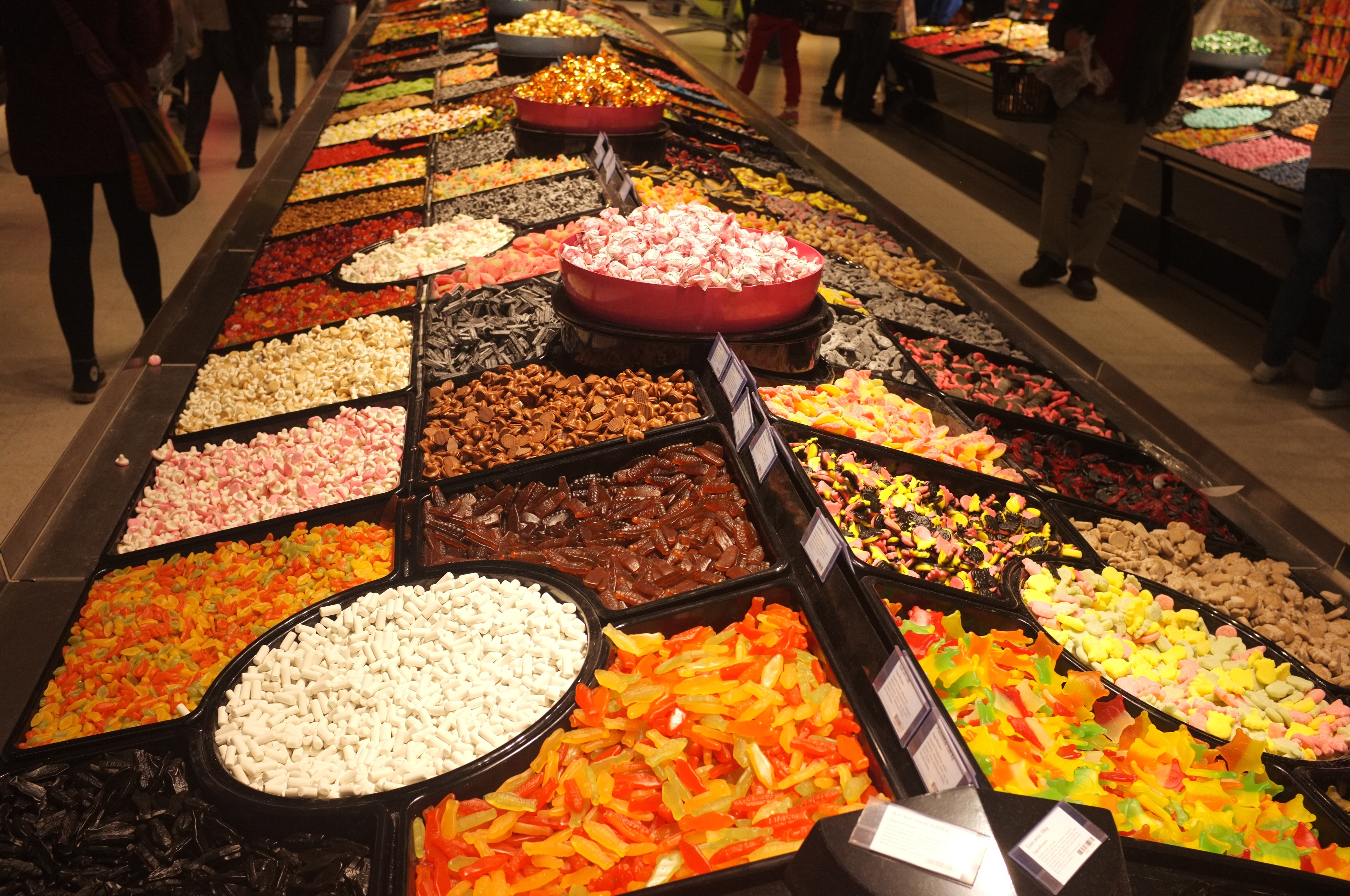 Smågodt. Nordby Shoppingcenter i Sverige.